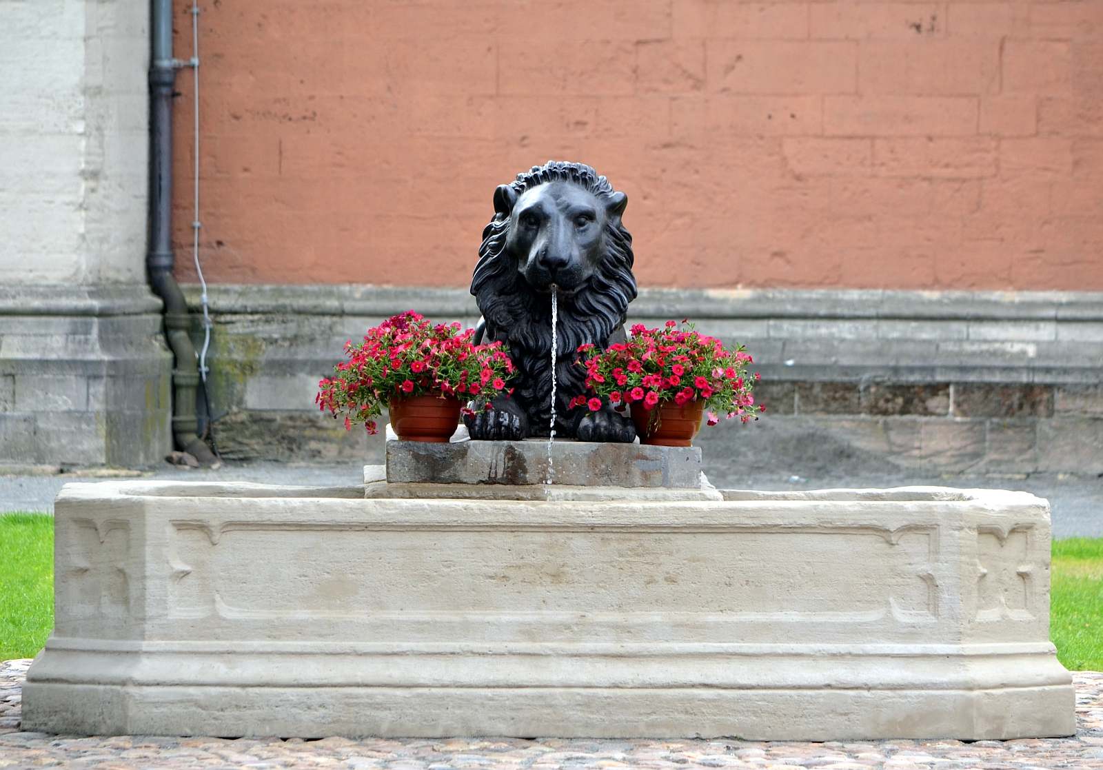 Braunschweig, Löwenbrunnen: frontale Ansicht von Norden (im Hintergrund die Katharinenkirche).